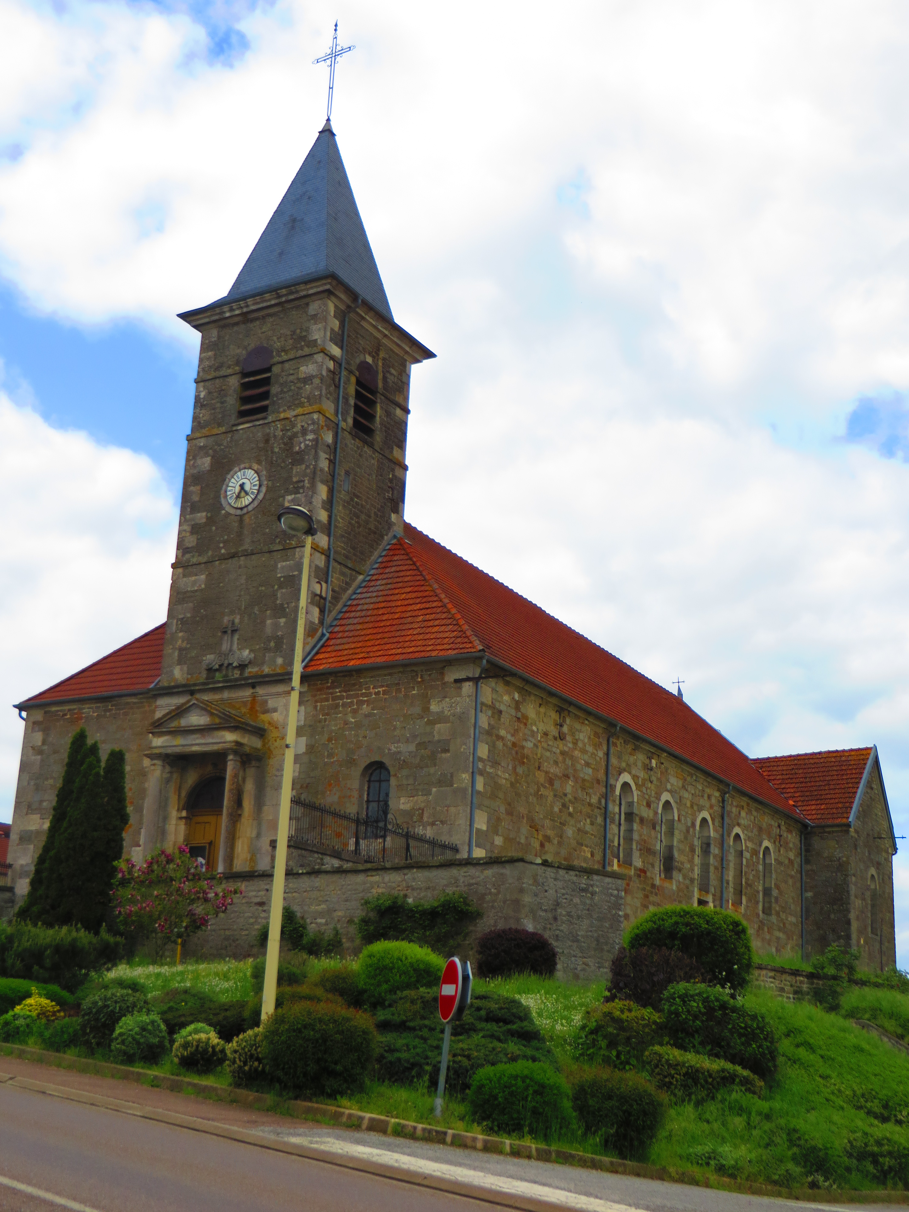 Dammartin-sur-Meuse église Saint Martin